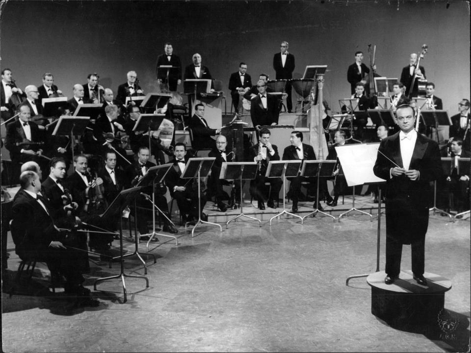 Astor Piazzolla y su orquesta se presentan en Canal 13, en 1963. Foto Archivo AGN.